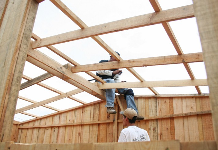 Jóvenes construyendo una vivienda temporal en El Salvador.